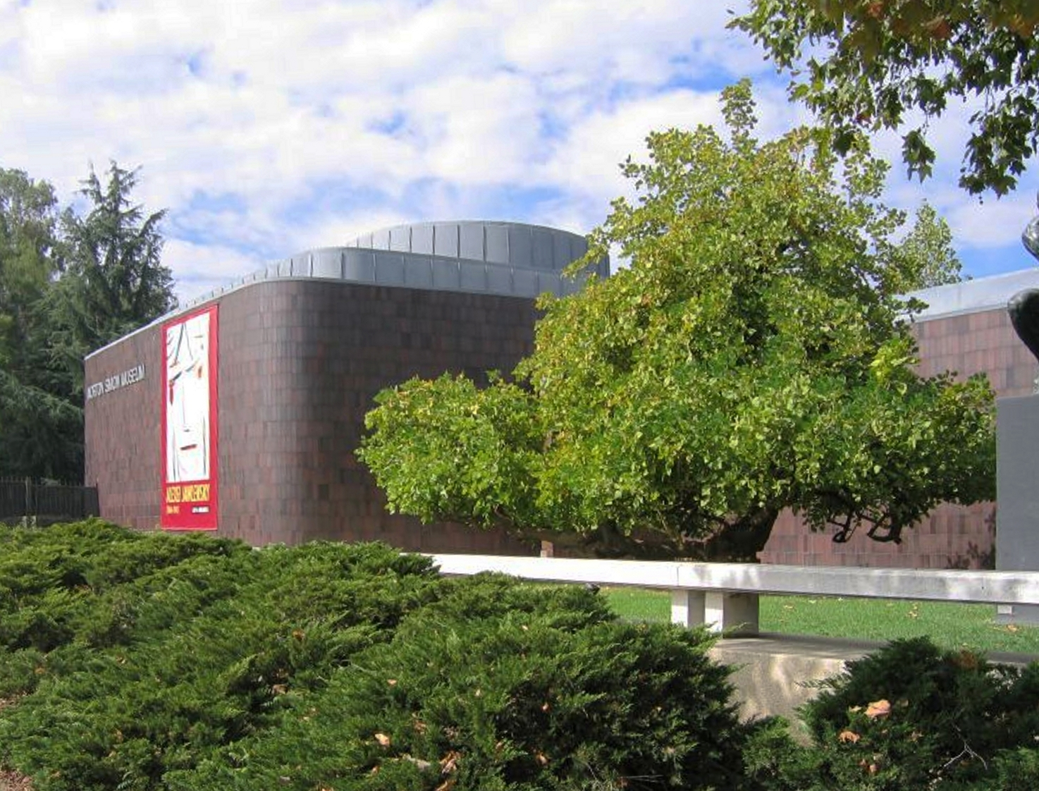 autre gros boulou du coin (lui c'est l'alimentaire) qui collectionnait des oeuvres d'art européennes et asiatiques